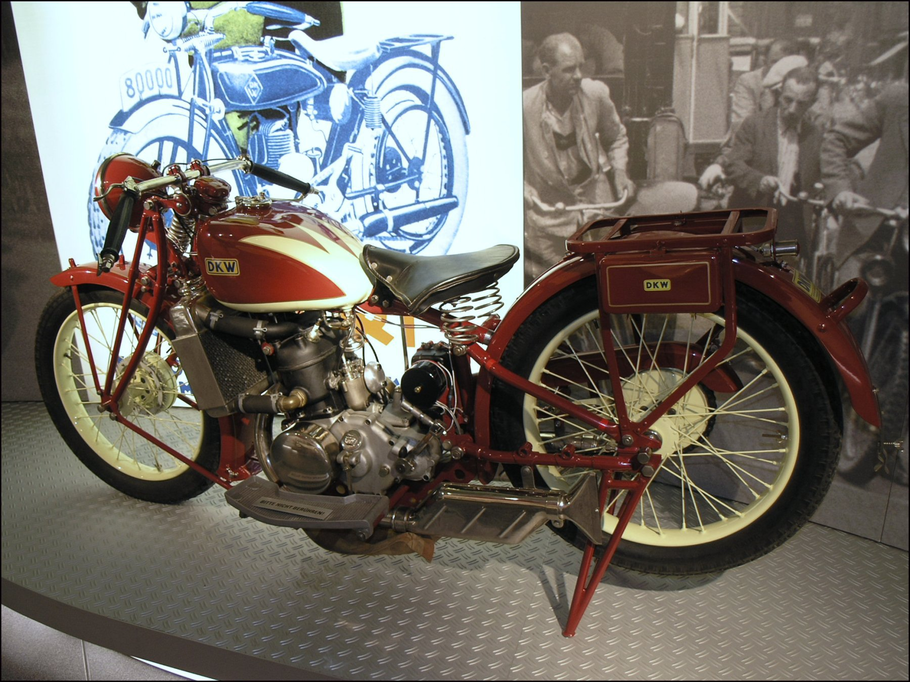 DKW Super Sport 500 (1929 / 1929-1933 cca 1200 motocyklů